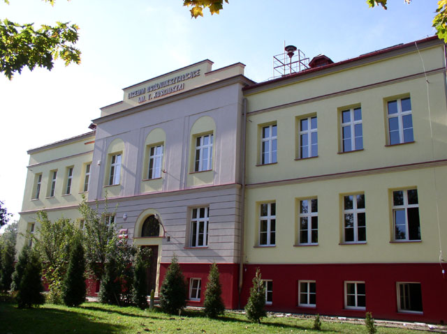 Liceum Ogólnoksztacące w Dąbrowie Tarnowskiej